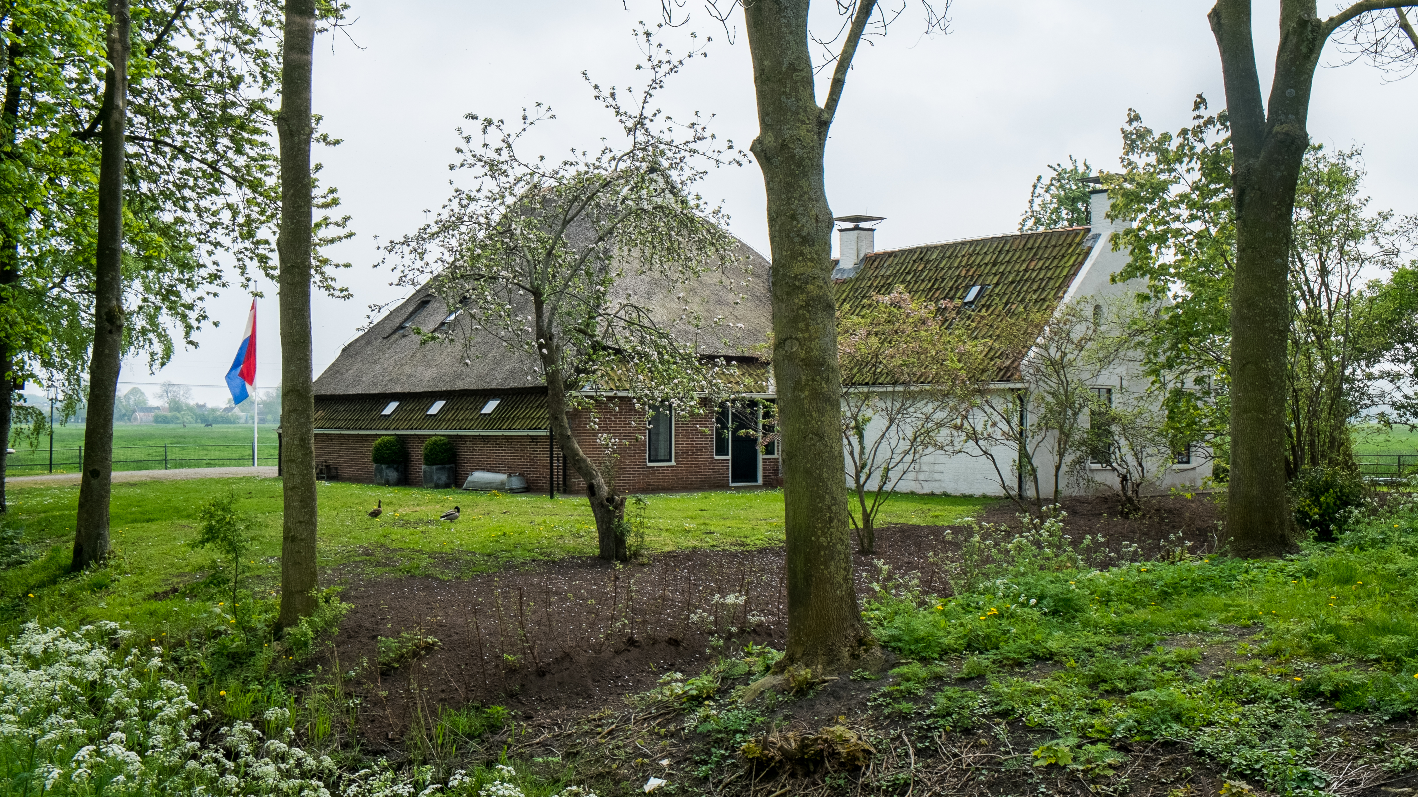 Leegeweg 36. De oude kosterij van Leegkerk